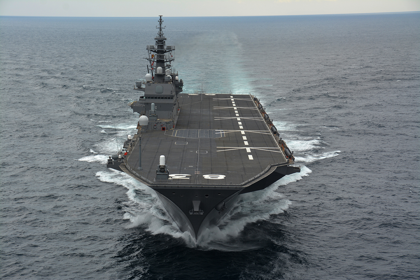 DDH-183 いずも